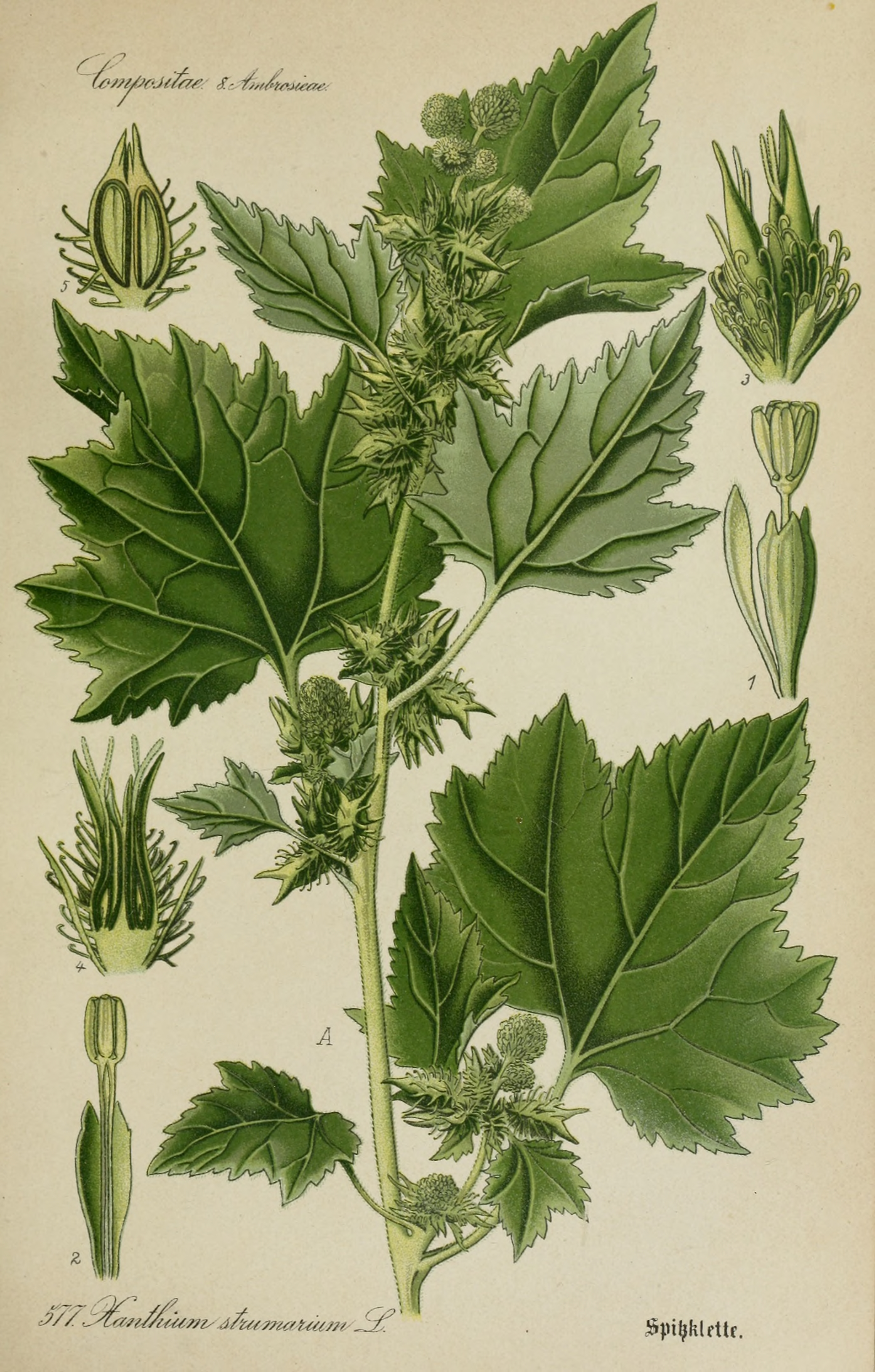 Legende: A Oberer Teil der Pflanze. 1 Männliche Röhrenblüte mit Spreublatt. 2 Männliche Röhrenblüte, Kronröhre aufgeschnitten. 3 Weibliches Körbchen. 4 Weibliches Körbchen, Längsschnitt. 5 Reifes weibliches Körbchen, Längsschnitt. 1-5 vergr.